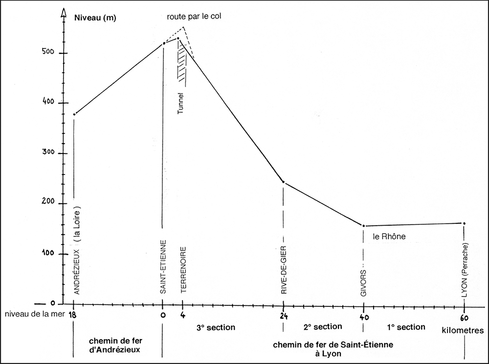 Schéma descriptif du profil des premiers chemins de fer autour de Saint-Étienne.